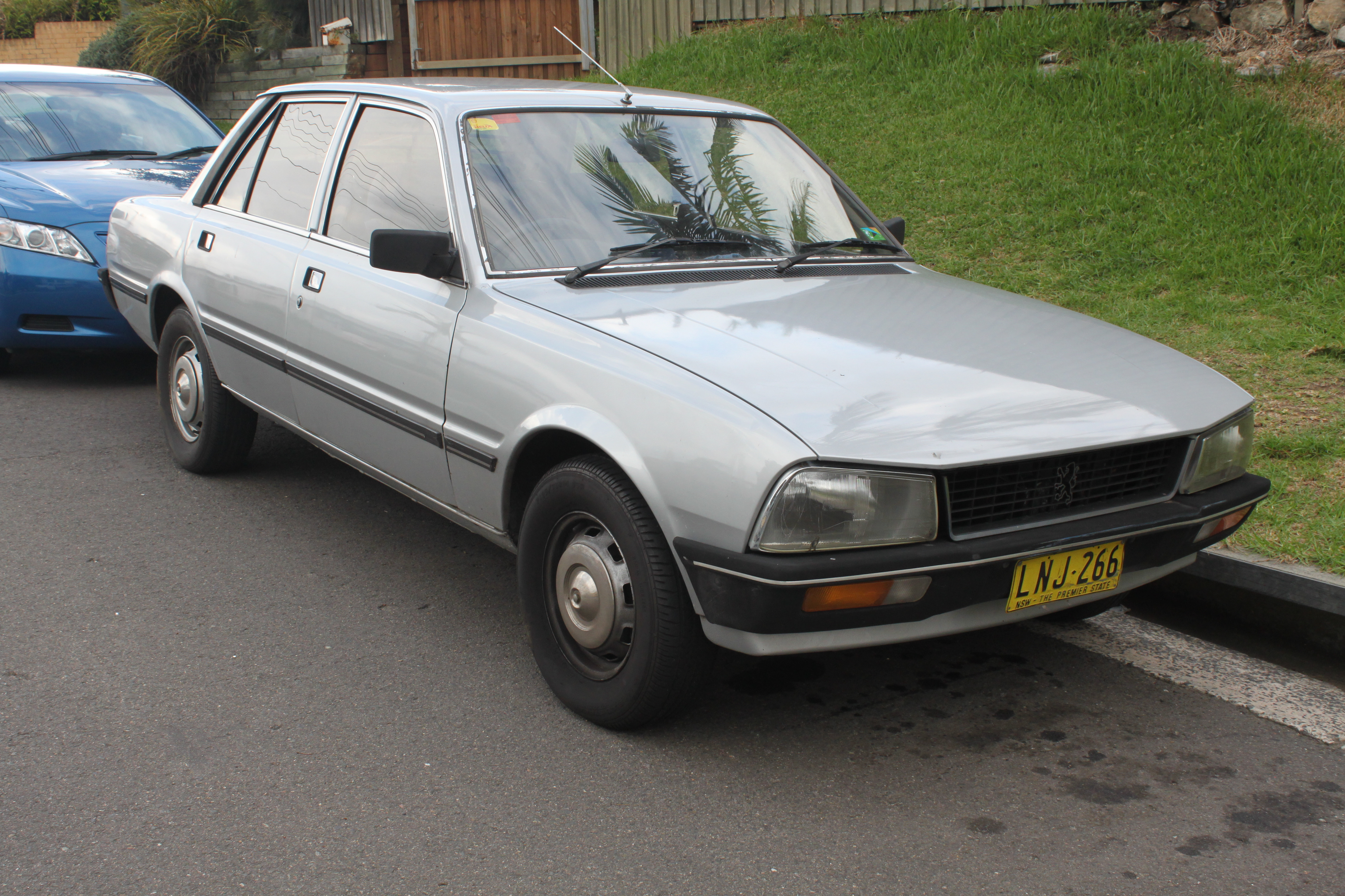 Peugeot 505 GR